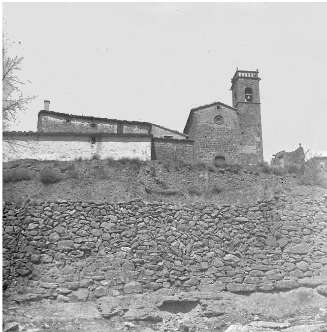 Església de Sangrà. Josep Salvany i Blanch (1917)